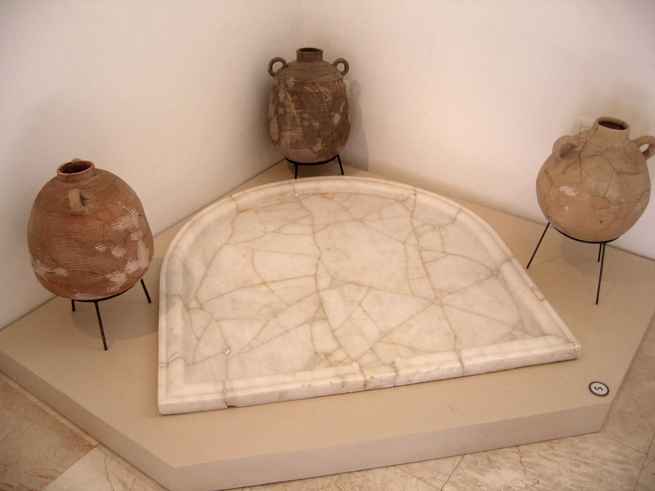 לוח של שולחן שיש, מנזר מרטריוס